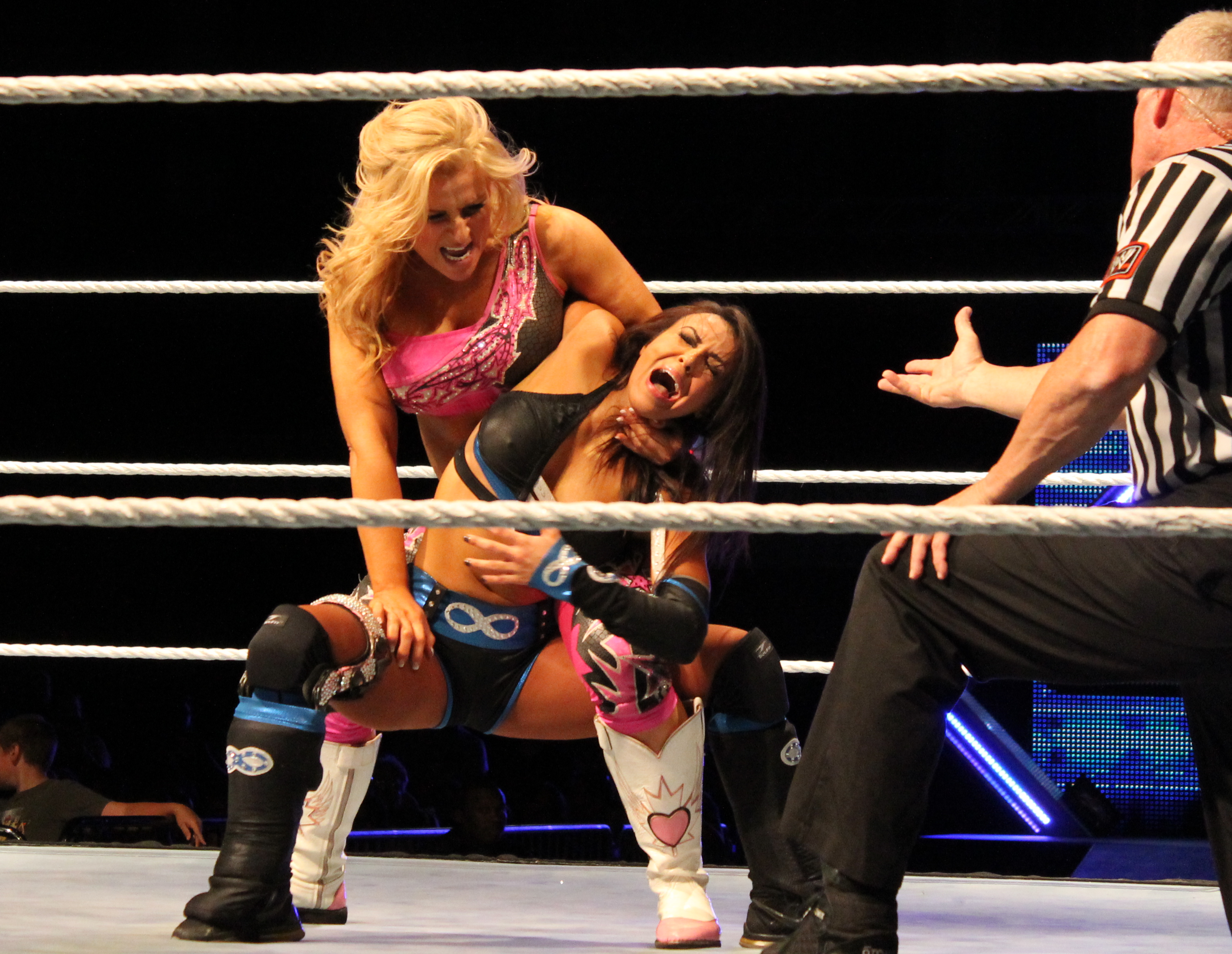 Natalya applying the Abdominal Stretch on Layla during a WWE house show in 2012